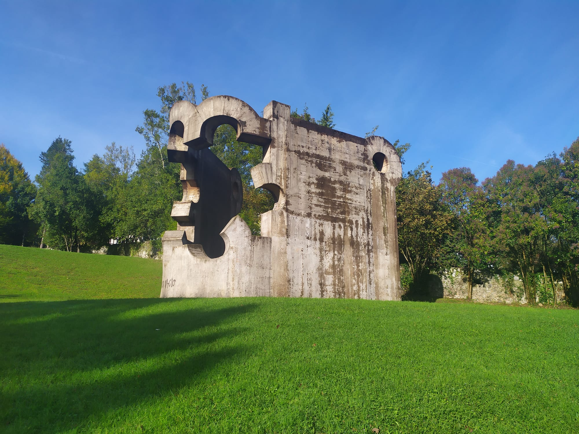 Obra de Eduardo Txillida llamada "Gure Aitaren Etxea" (La casa de nuestro padre) en Gernika-Lumo.